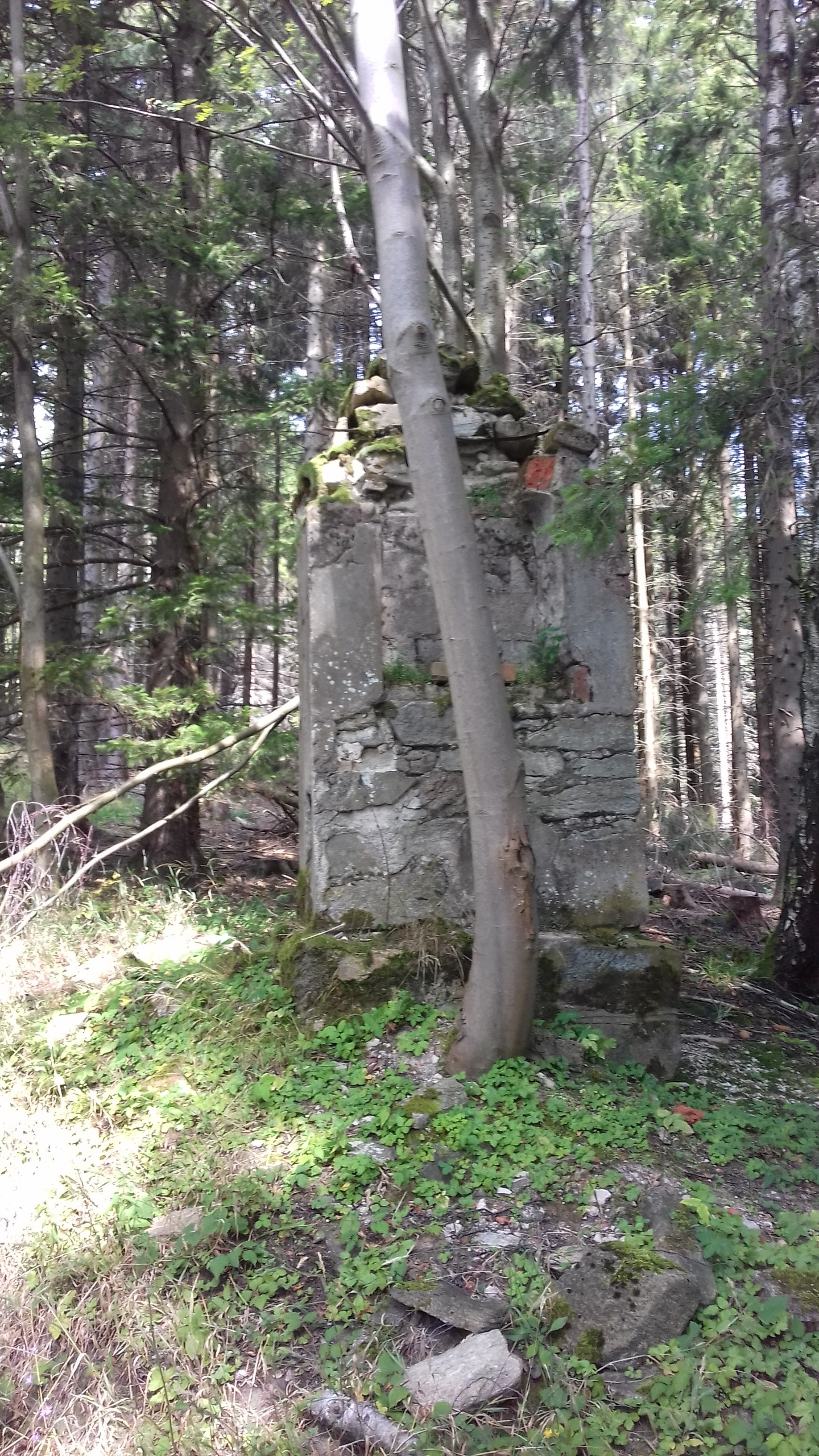 zastavení kaplička